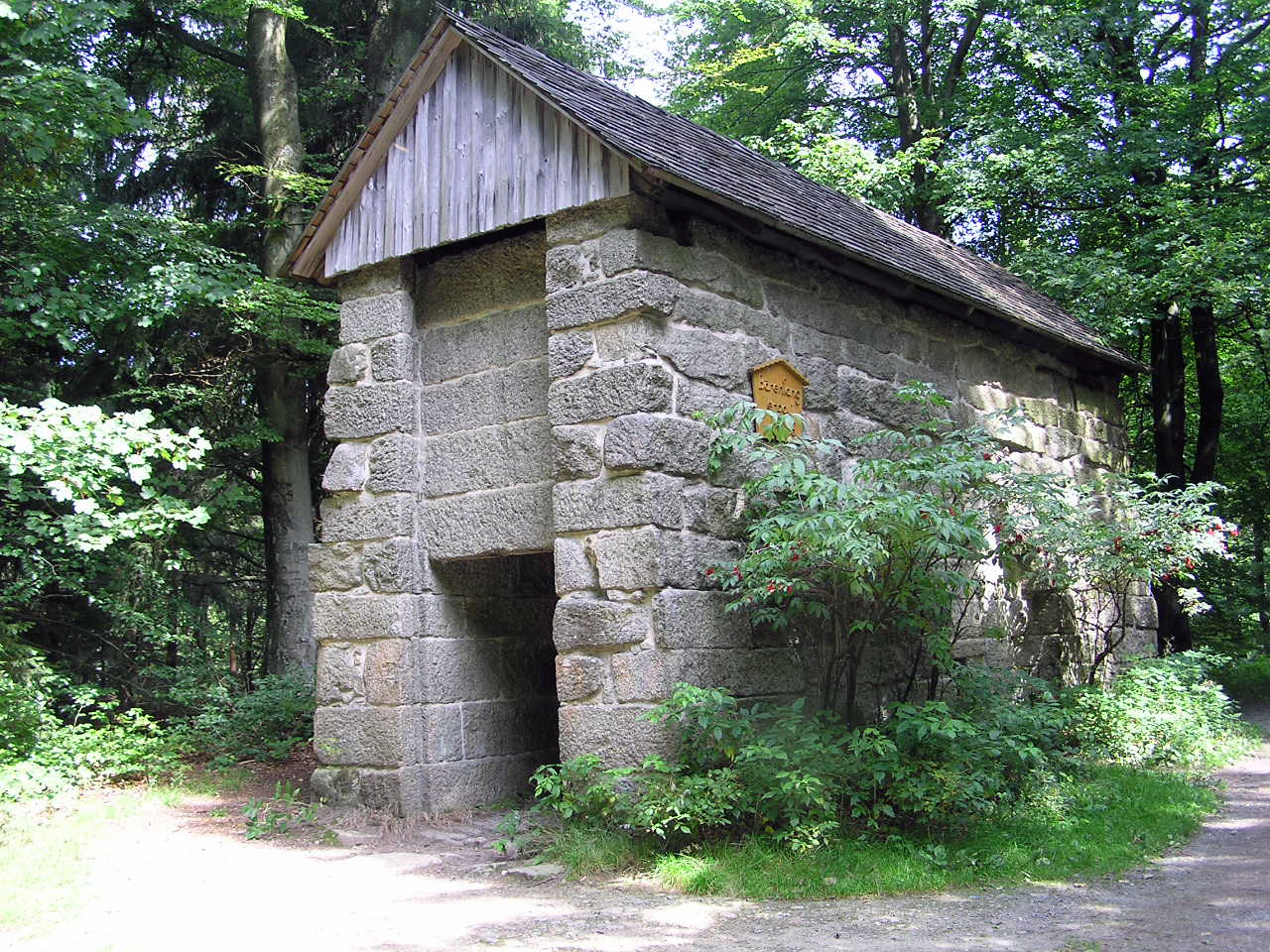 Description: Großer Waldstein, Baerenfang Source: selbst fotografiert Date: 19. August 2005 Author: Schubbay